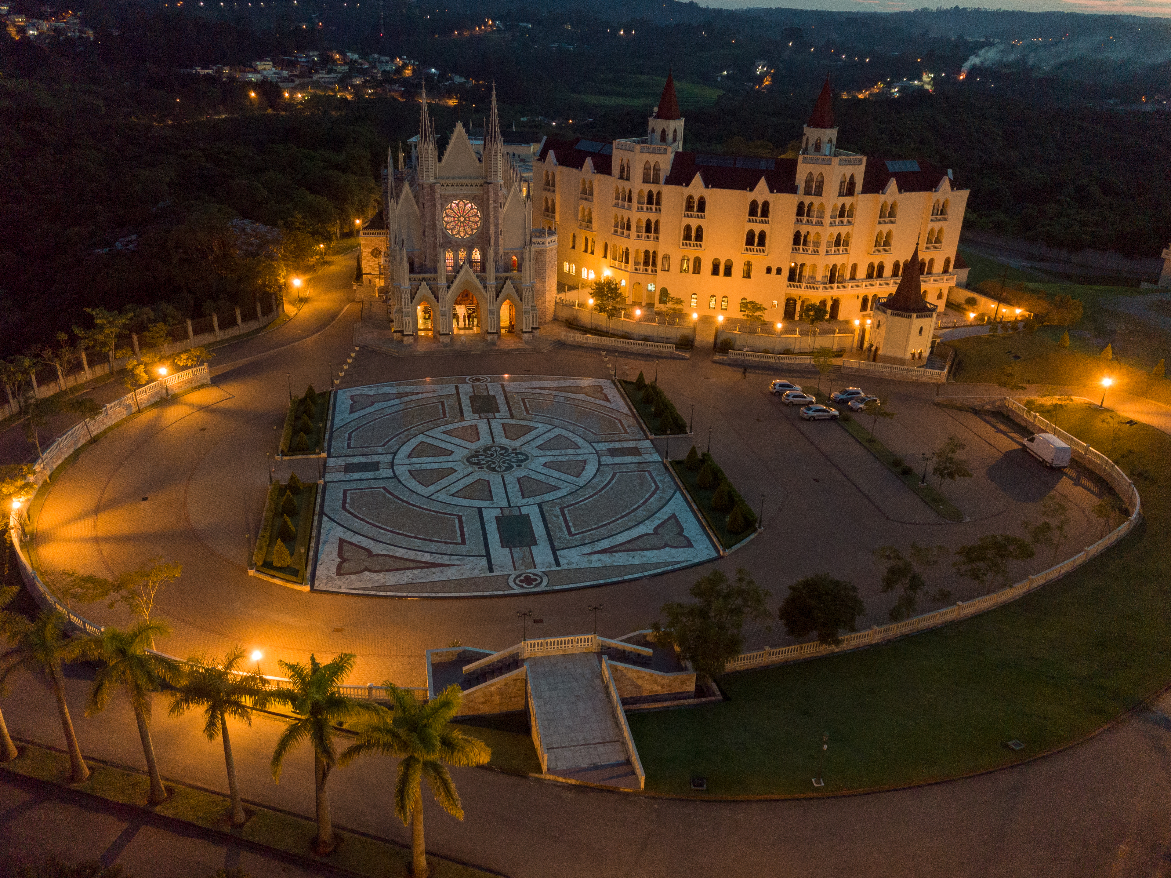 Basílica Nossa Senhora do Rosário de Fátima